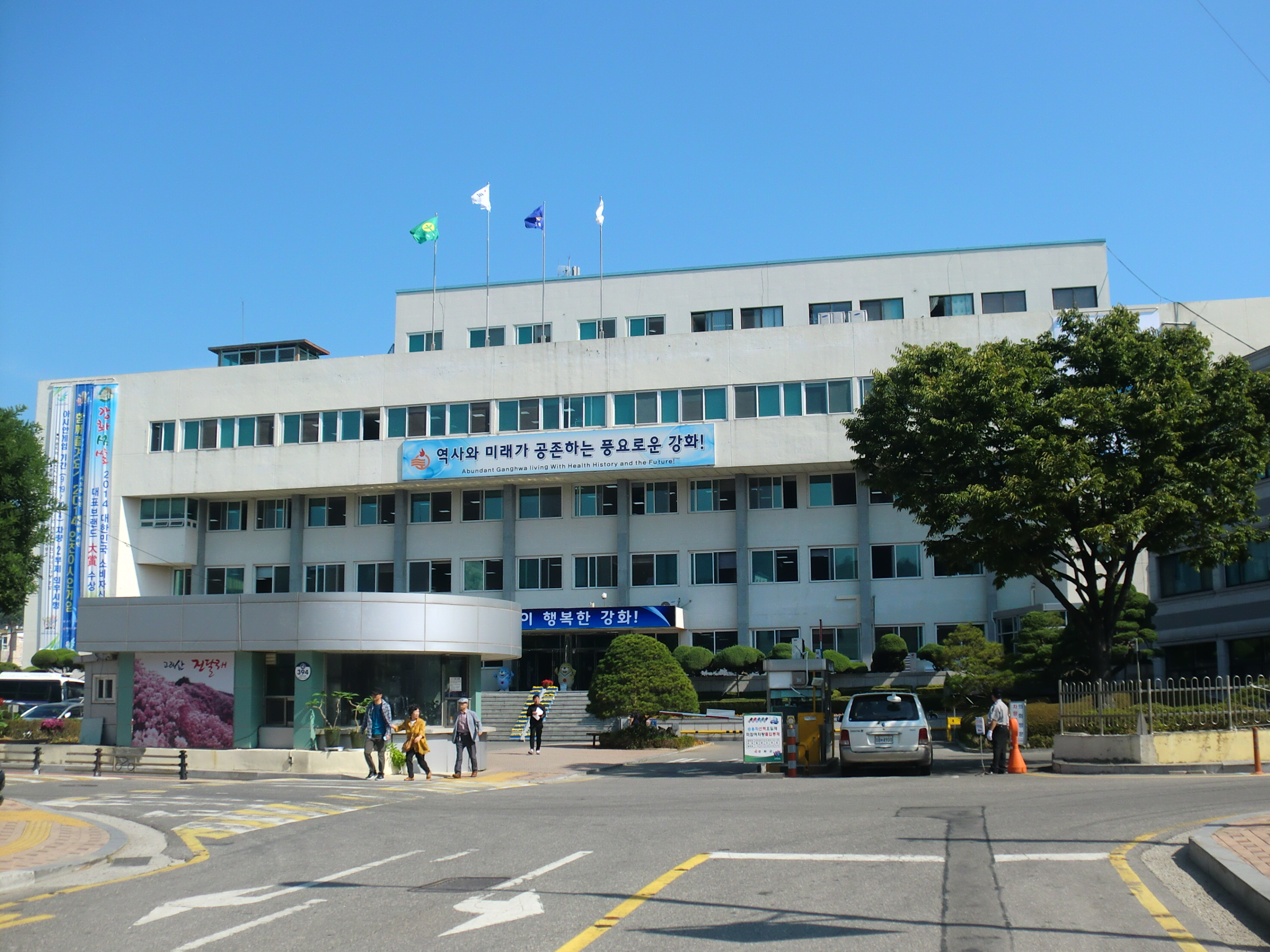 인천광역시 강화군에 있는 강화군청